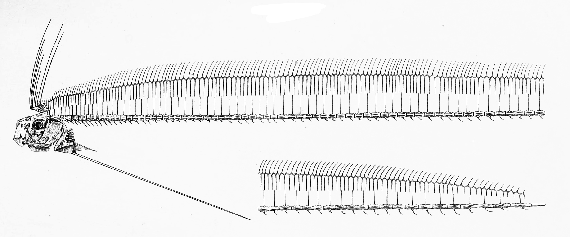 Regalecus glesne skeleton